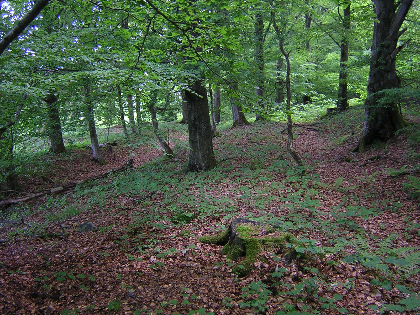 Heidenstraße irgendwo im Wald zwischen Winterberg und Küstelberg (Medebach); Hochsauerlandkreis